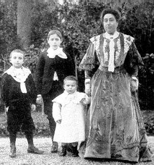 Mme Loubet et ses enfants (trois), son mari était président de la République française.